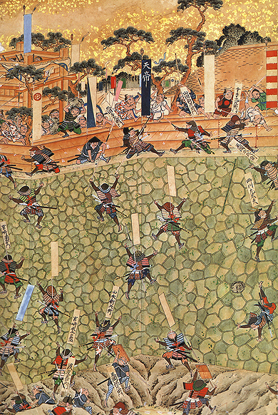 Штурм правительственными войсками цитадели повстанцев, замка Хара